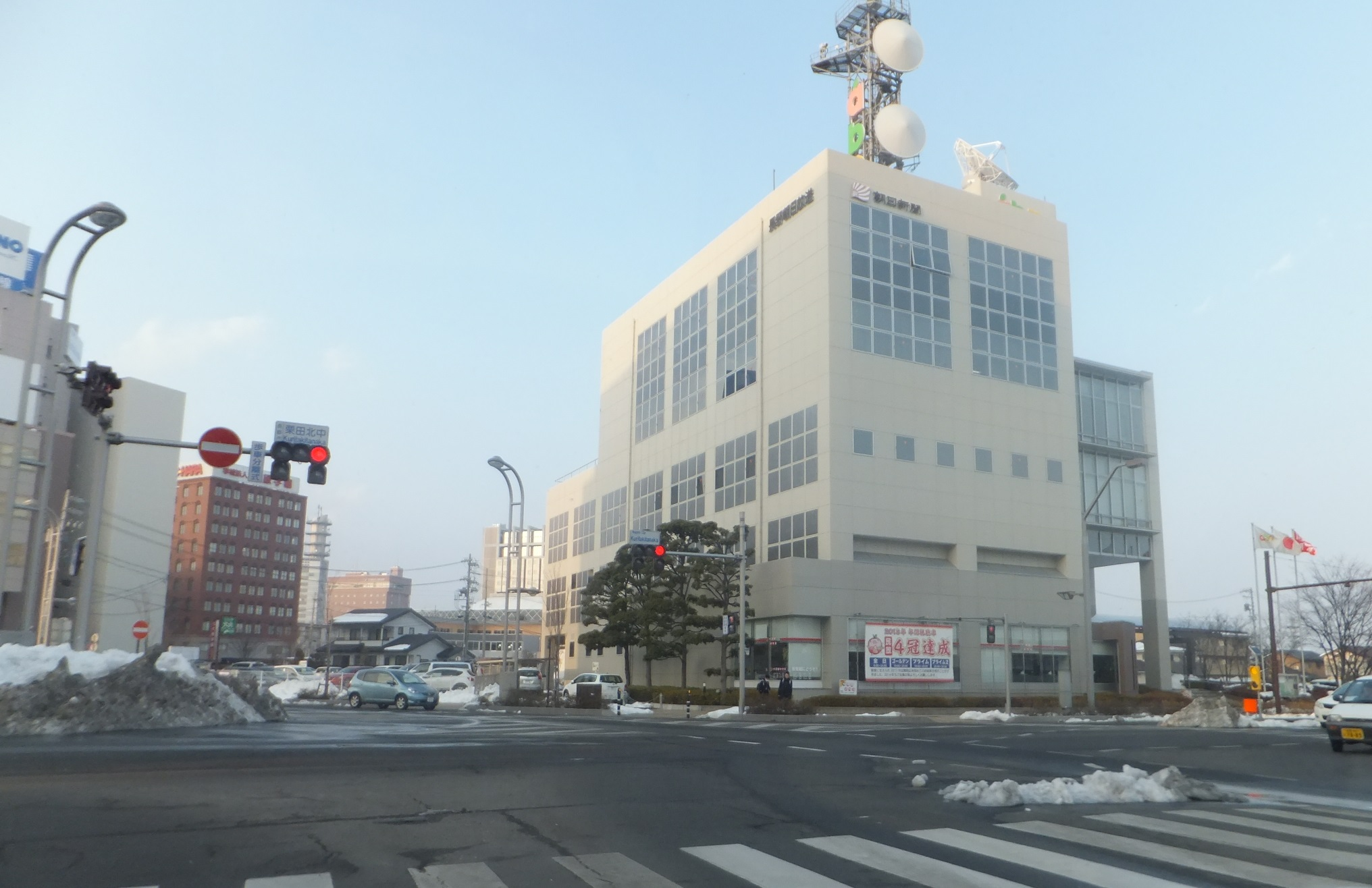 長野朝日放送